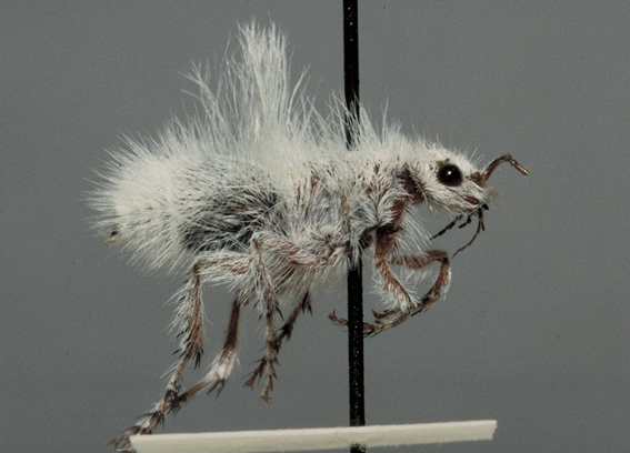 Female velvet ant Dasymutilla gloriosa